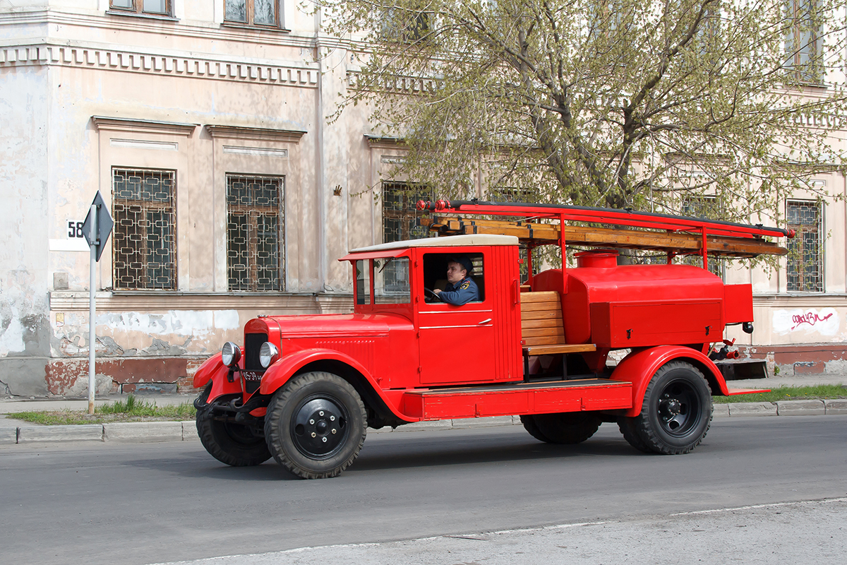 Парад пожарной техники в г. Барнауле 30 апреля 2016 г.